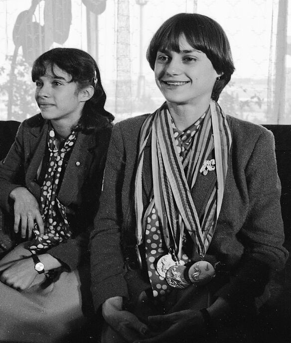 Gimnasta Nadia Comăneci (dr), medaliată cu aur la bârnă și sol și cu argint la individual compus.